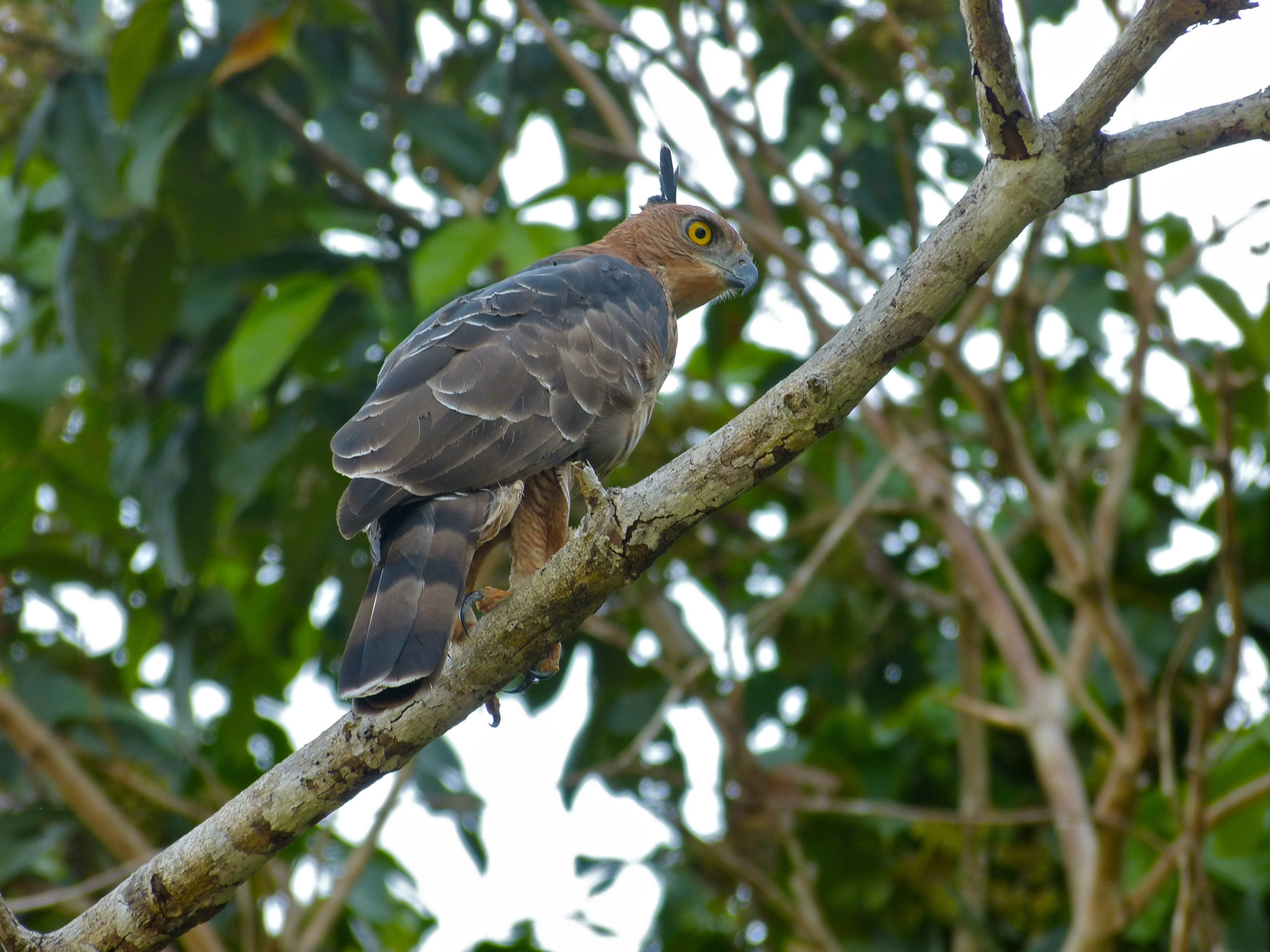 Kinabatangan River, Sukau, Sabah, MALAYSIA